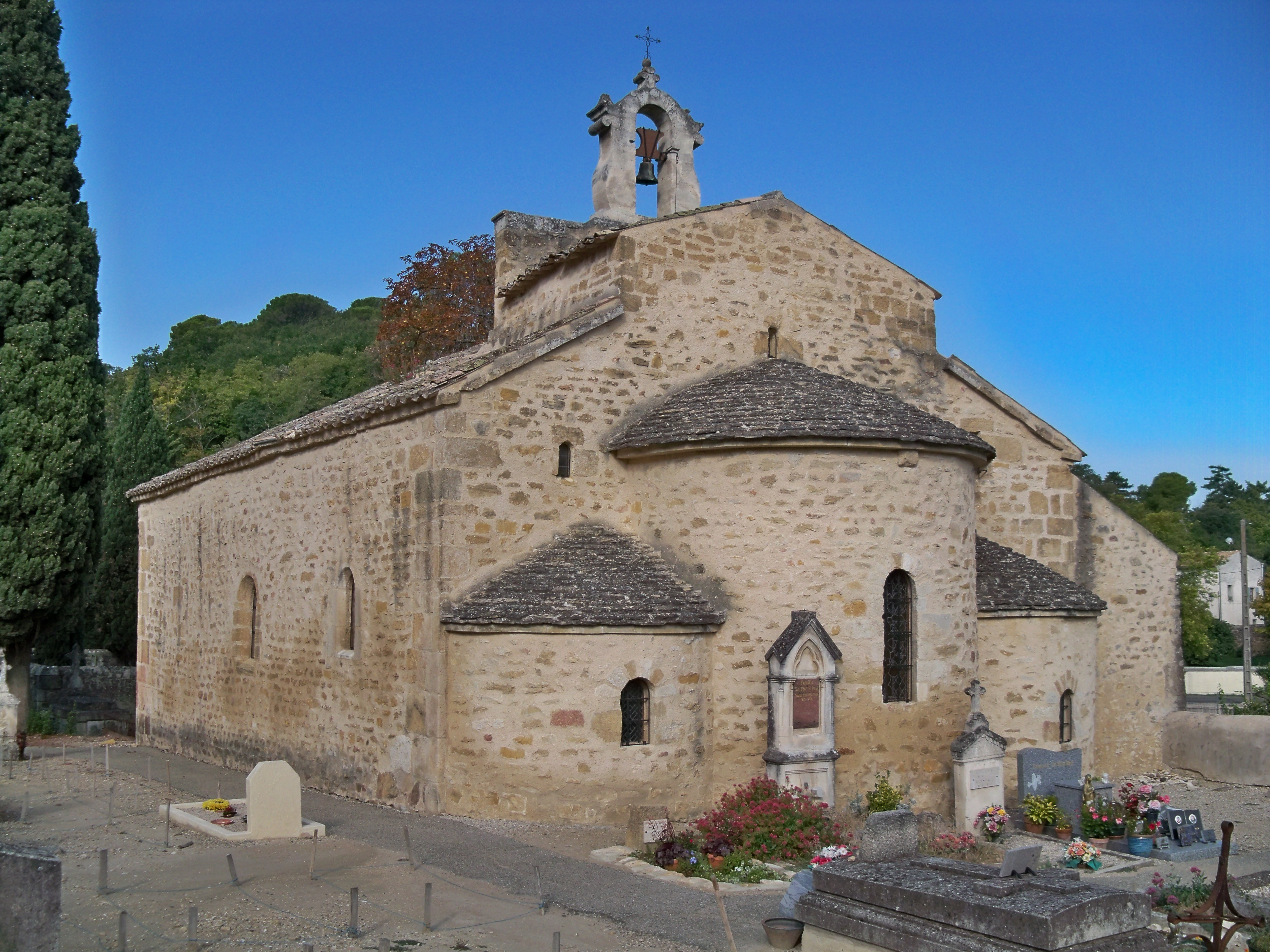 Chapelle Saint-Denis, (Inscription, 1926) : Abside .